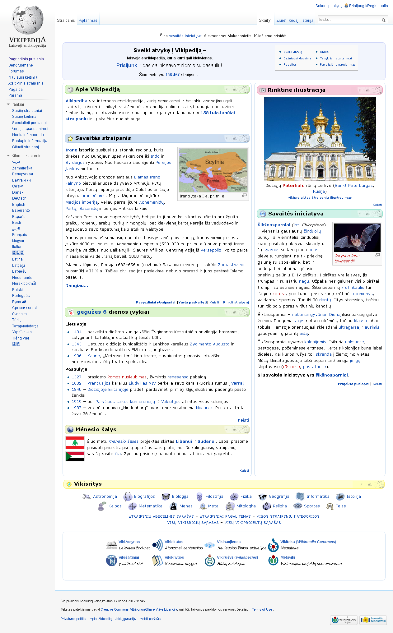 Česky: Screenshot - Hlavní strana Litevské Wikipedie ze dne 7. května 2013